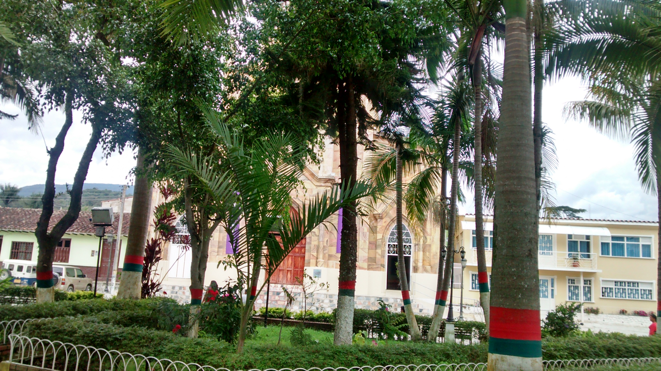 Parque urbano del municipio de Togui, Boyacá, Colombia